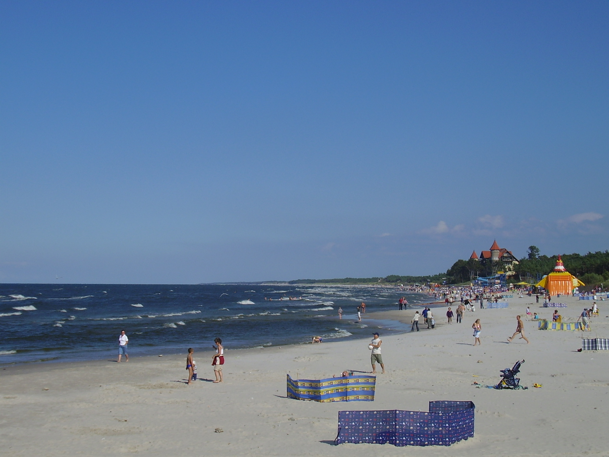 Plaża w Łebie